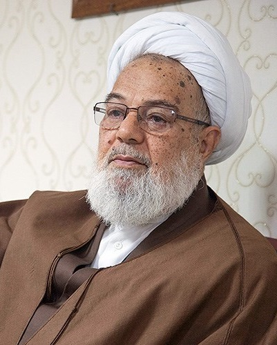 حسن ممدوحی